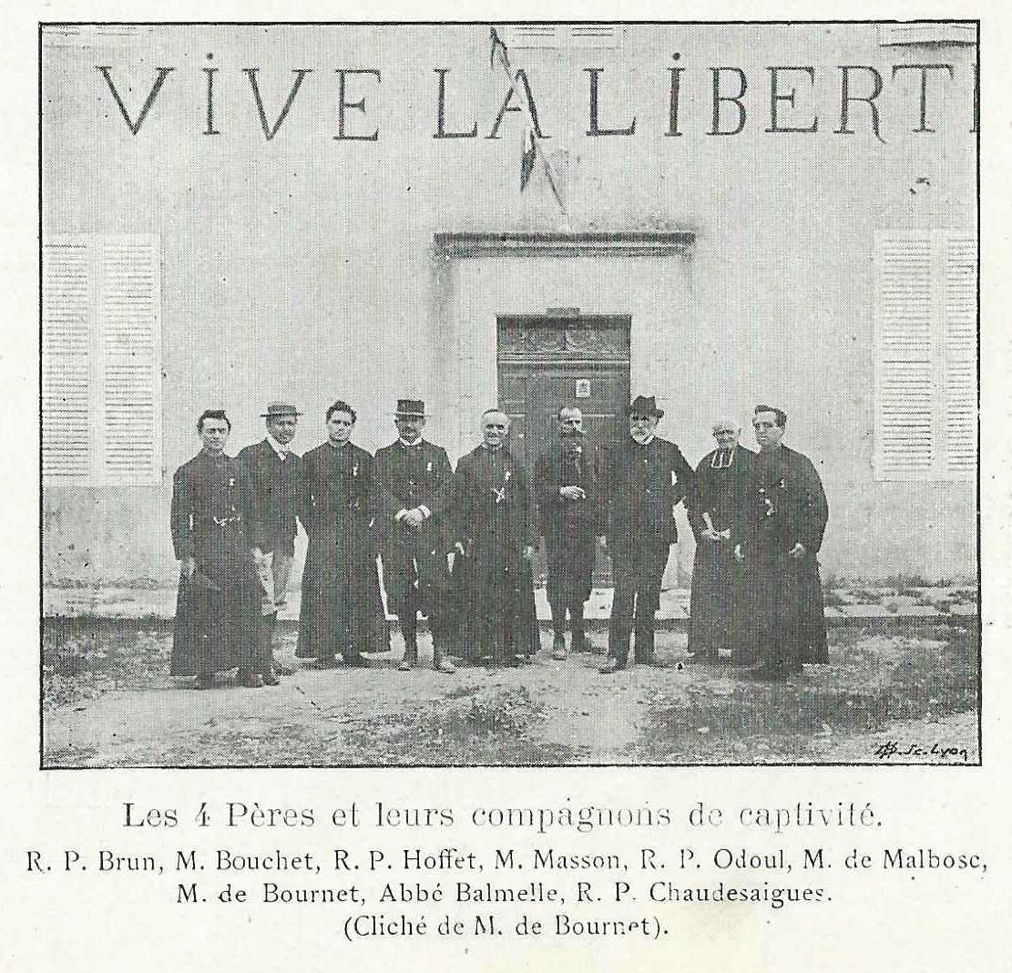 3 juin 1903 - Lezs prisonniers de Notre-Dame de Bon-Secours